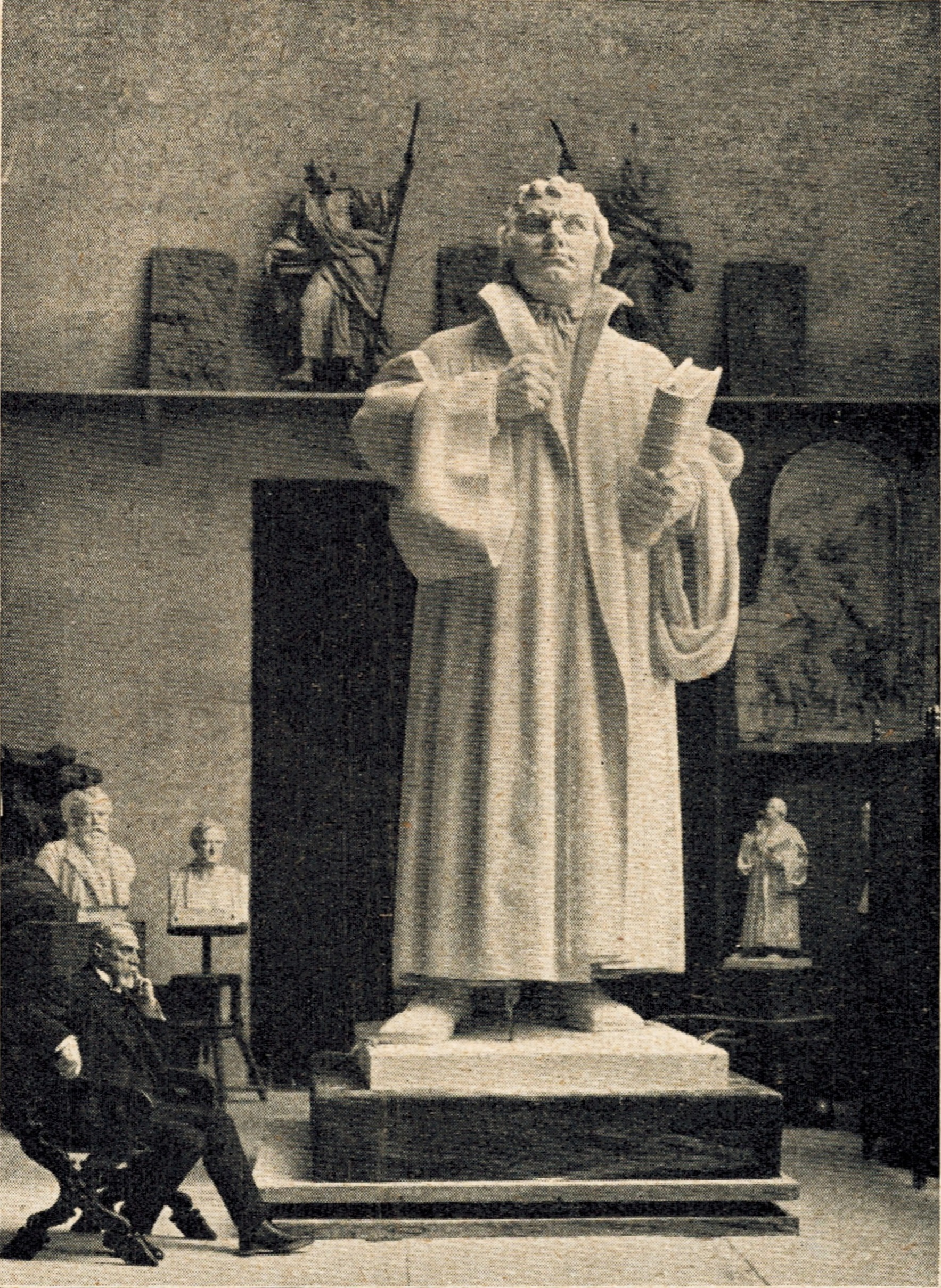 Otto Lessing en primavera de 1912, pocos meses antes de su muerte, posando con su última obra, el modelo de una estatua monumental de Lutero prevista para ser instalada en Hamburgo.